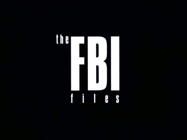 Заставки из серии американских телевизионных документальных фильмов «The FBI Files»